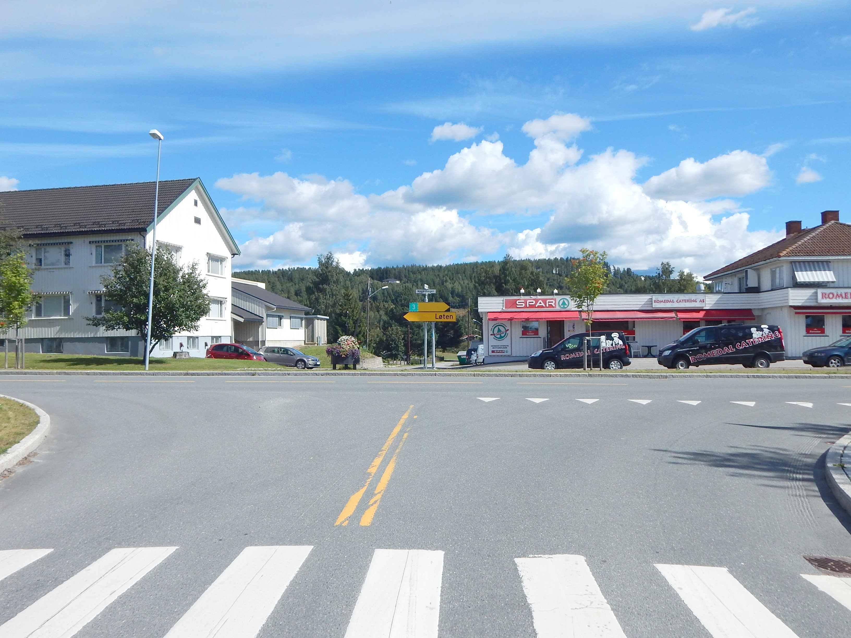 Krysset i Romedal sentrum mellom Mågårdvegen (fylkesvei 1900, tidl. 231) og Solvinvegen